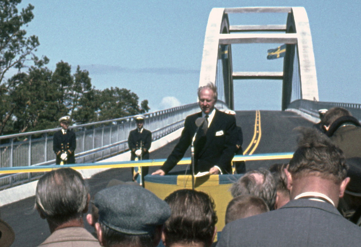 Djuröbrons invigning genom landshövding Erik Westerlind 26 maj 1962